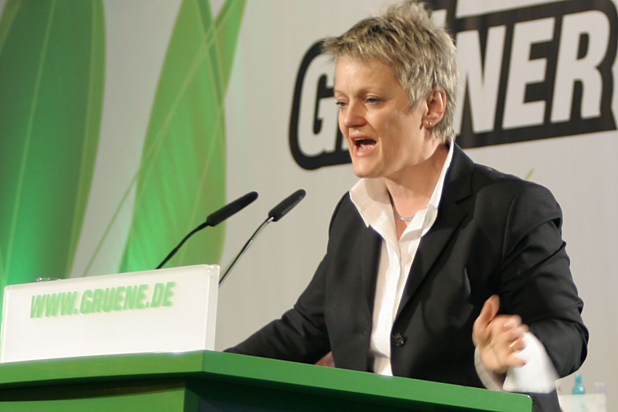 Renate Künast Anfang Dezember 2006 auf dem Bundesparteitag der Grünen in Köln